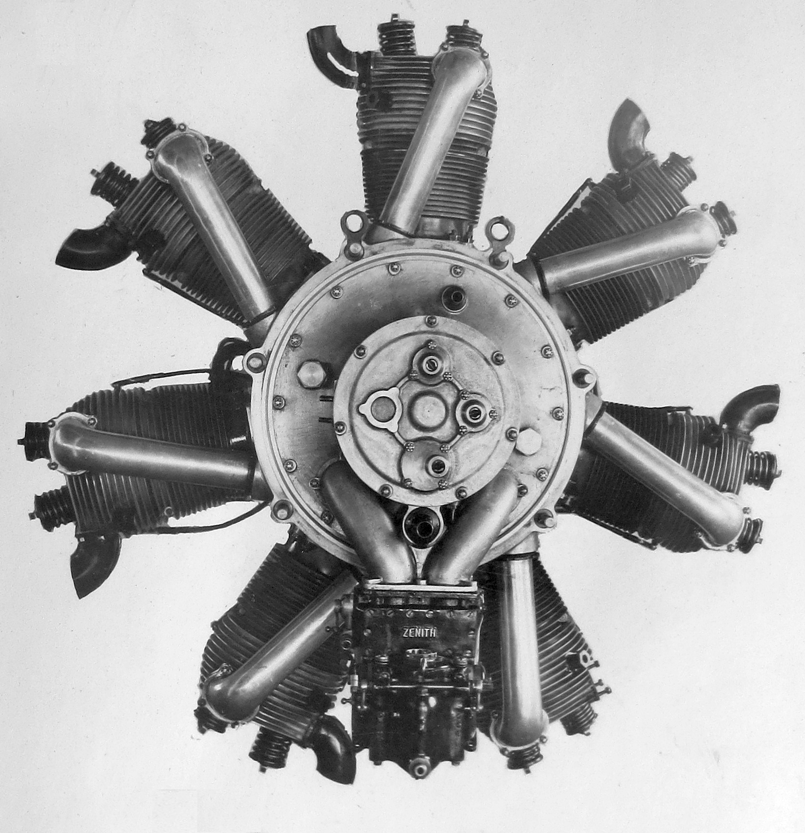 Walter Castor I (1928-35) rear view